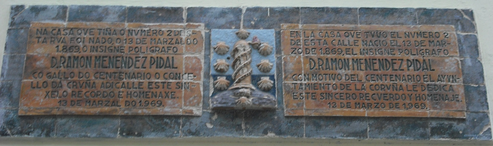 Placa conmemorativa del nacimiento de Menéndez Pidal situada en el número 2 de la calle de Santa María de La Coruña